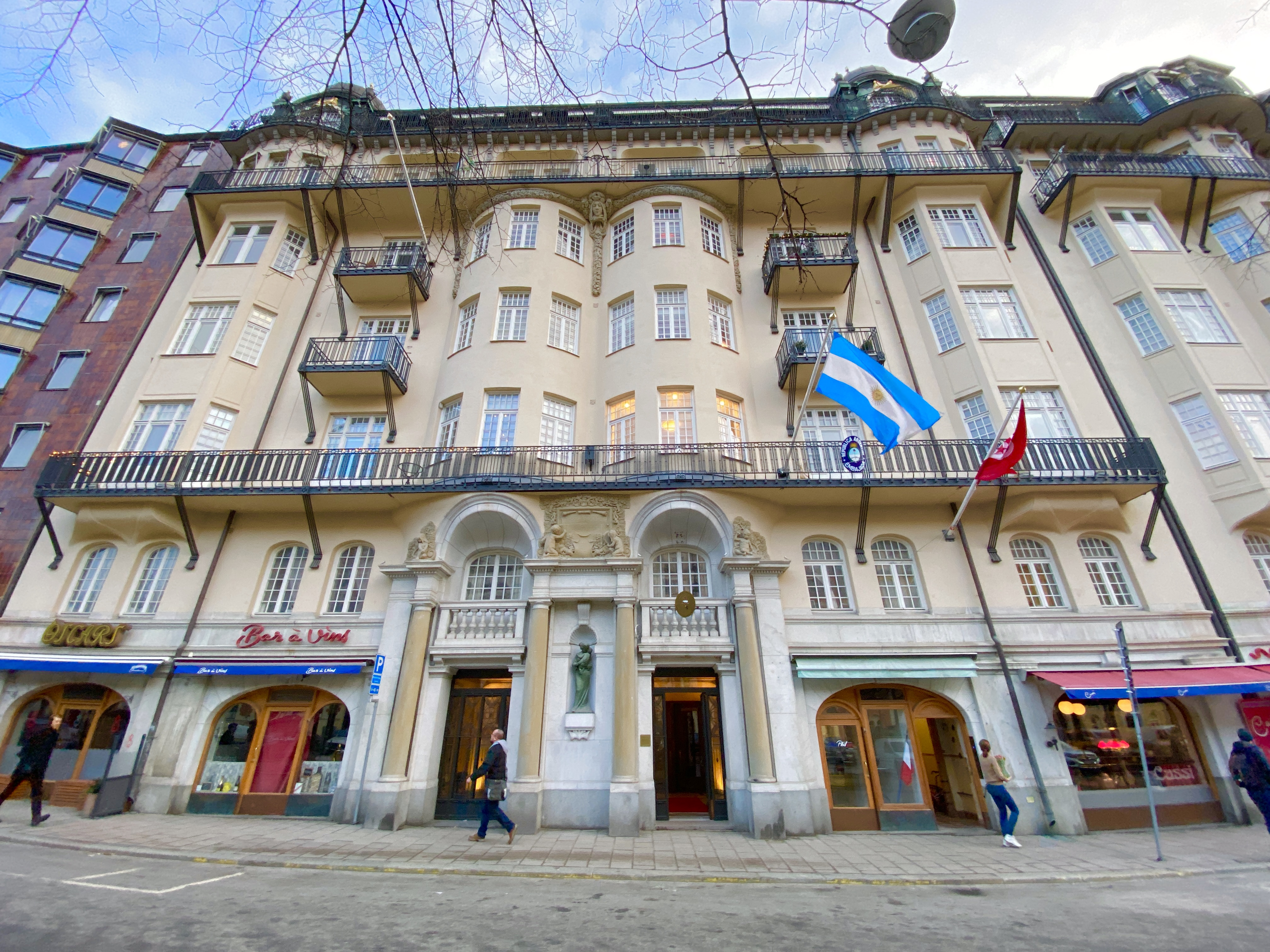 Argentinas Ambassad i Sverige